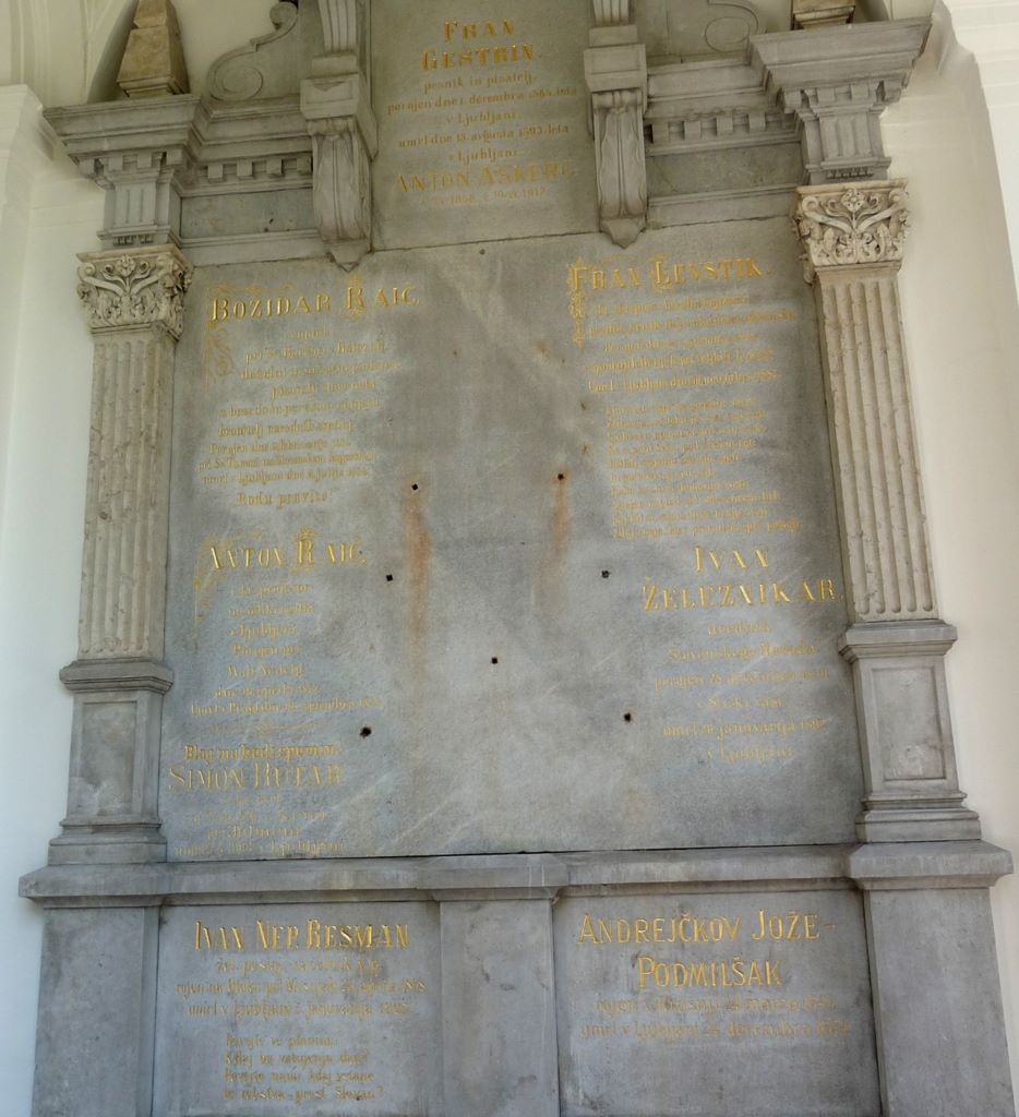 Fran Gestrin, Anton Aškerc, Božidar Raič, Simon Rutar, Fran Levstik, Josip Podmilšak, Ivan Nepomuk Resman, Ivan Železnikar, Andrejčkov Jože - Podmilšak. Neorenesančni stenski nagrobnik na Navju. Postavilo Pisateljsko podporno društvo. Odkrit 31. oktobra 1888.